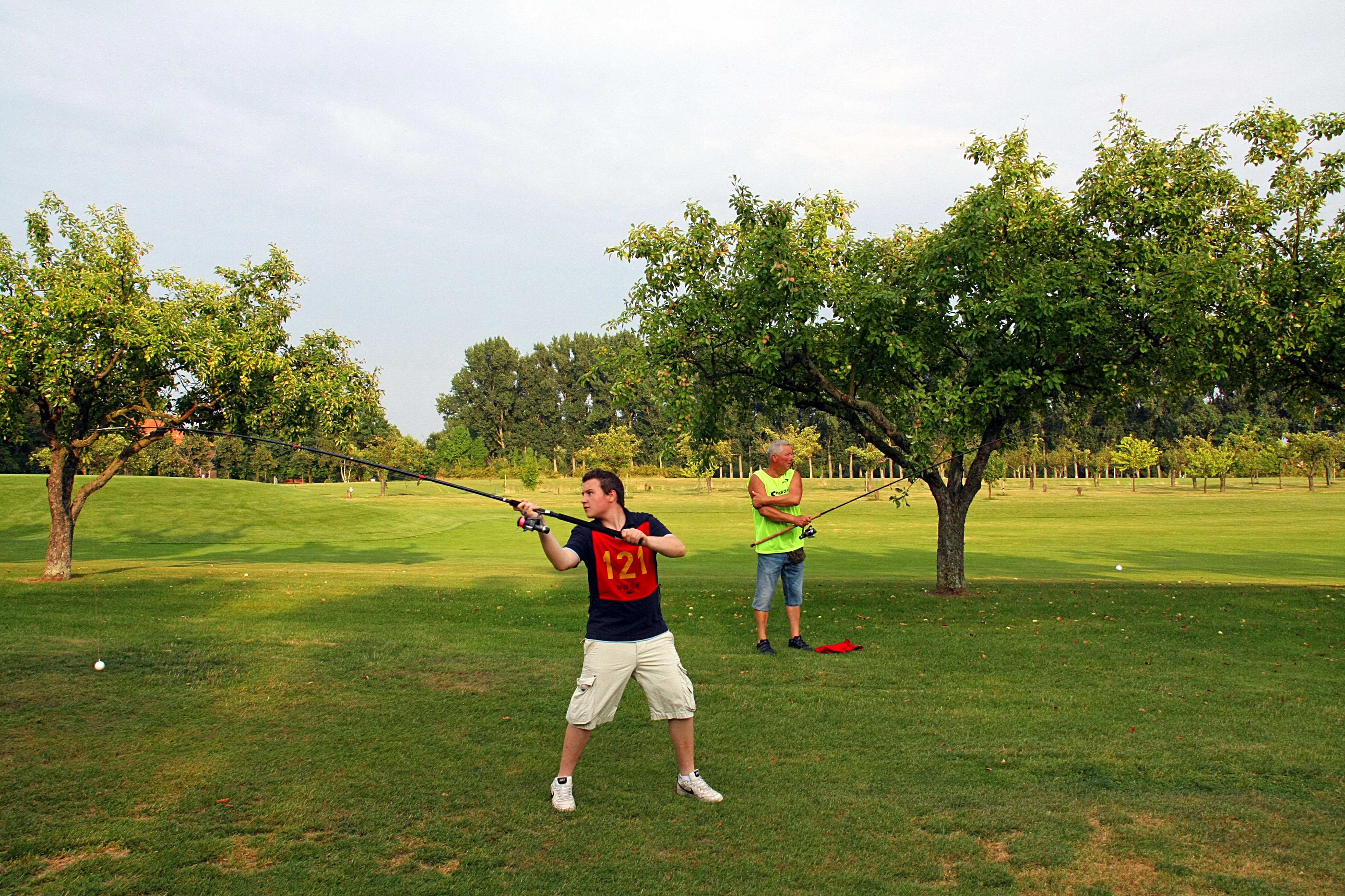 Ein Angelgolfsportler bei der Wurfausführung während des Angelgolfturniers 2008